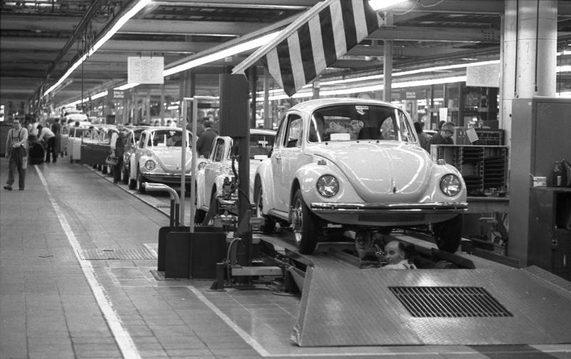 VW-Werk, Wolfsburg Montage-Käfer